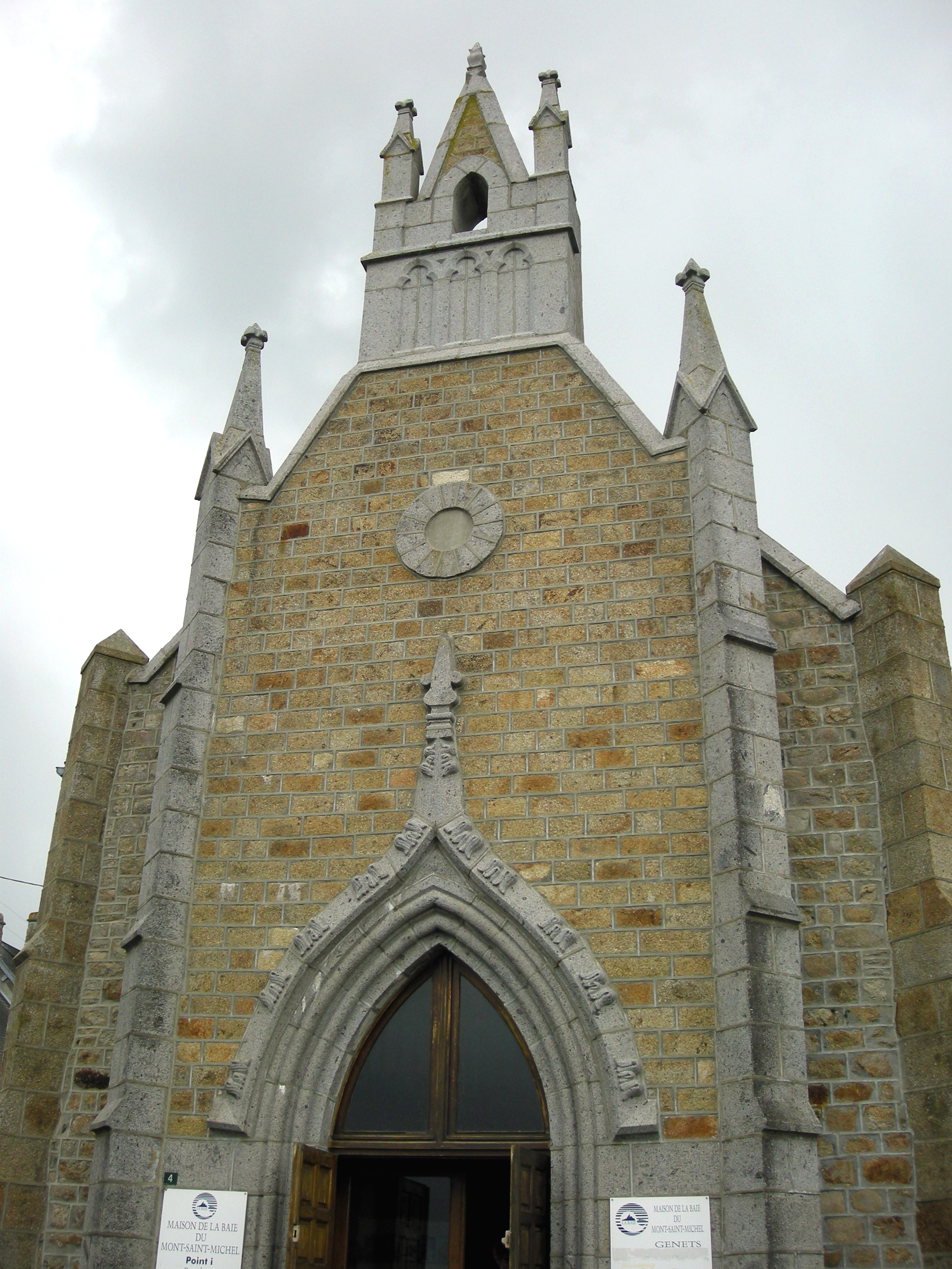 La Maison de la Baie, aménagée dans l'ancienne chapelle Sainte-Anne, à Genêts (Manche, Normandie)